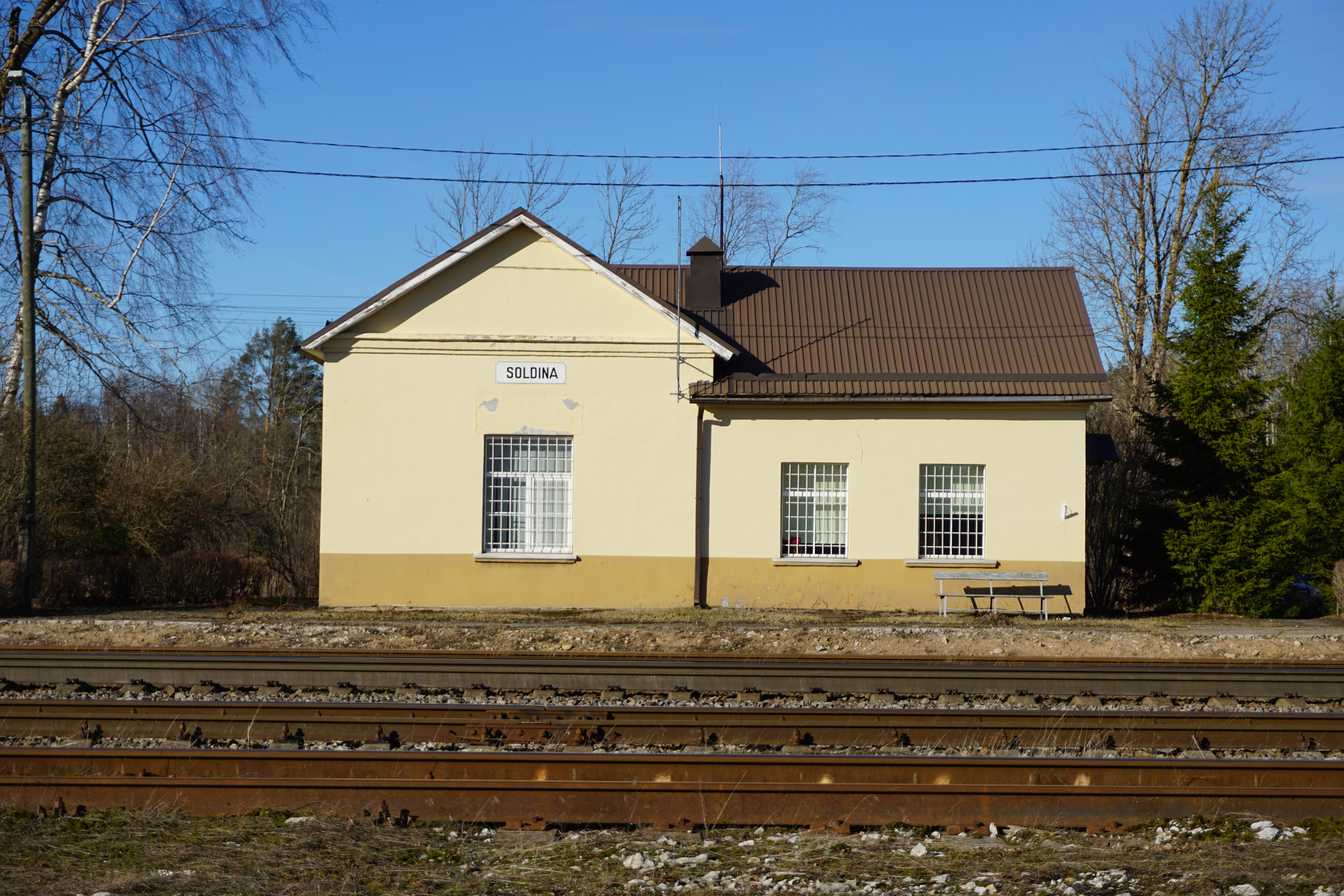 Jaamahoone ehitati 1950. aastate alguses tüüpprojekti järgi sarnaselt näiteks Abja, Keeni, Orava jmt jaamahoonetega. Stalinistlikus stiilis Soldina jaamahoone on selle tüübi lihtsustatud variant, kus madalam katusekalle ja silmatorkavast ootesaali paraadaknast loobumine annavad tulemuseks hoopis vernakulaarsema ning Eesti kontekstis omanäolise variandi. Jaamahoone on kasutusel tänini.